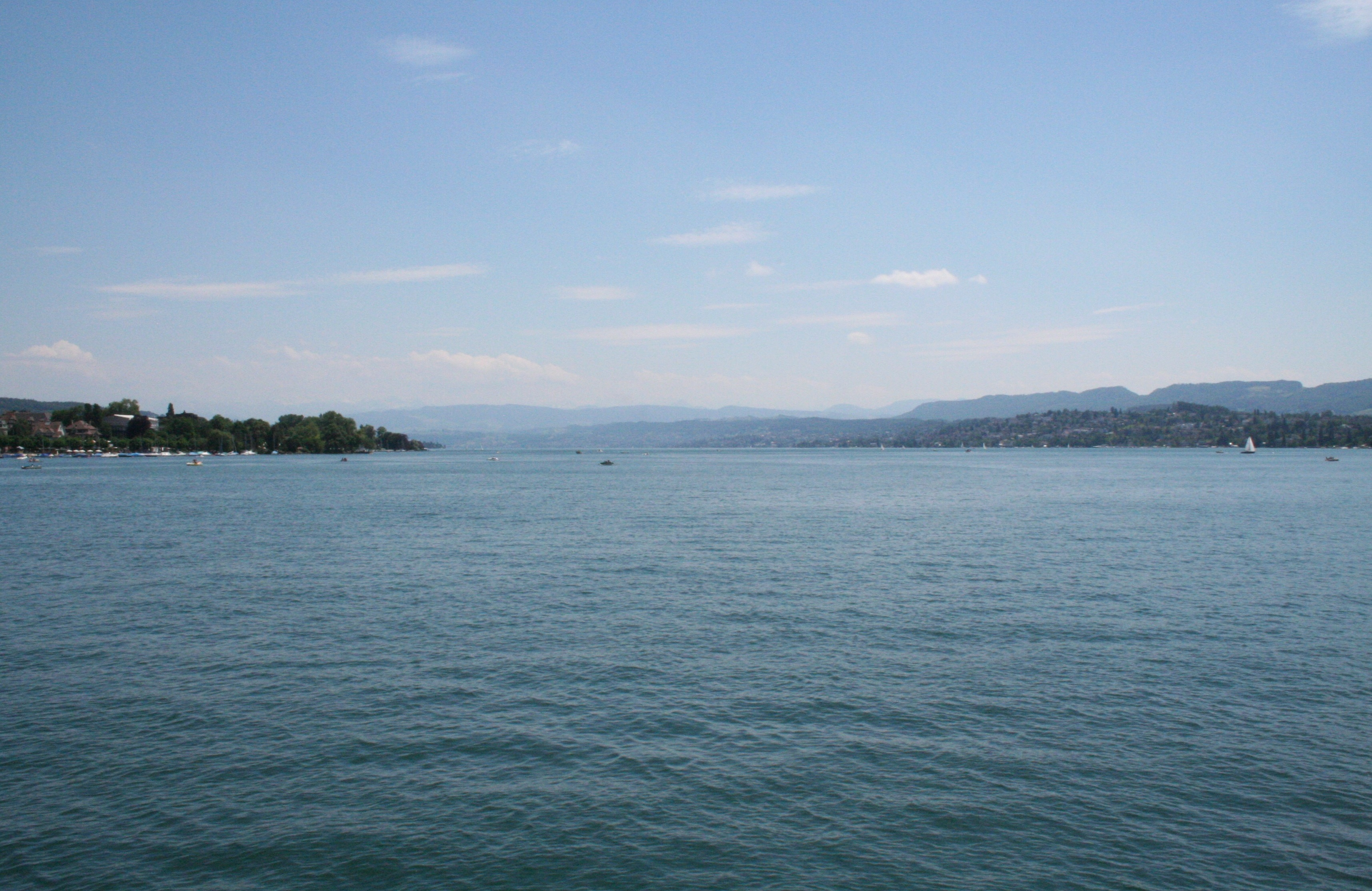 Zürichsee, Blick nach Süden